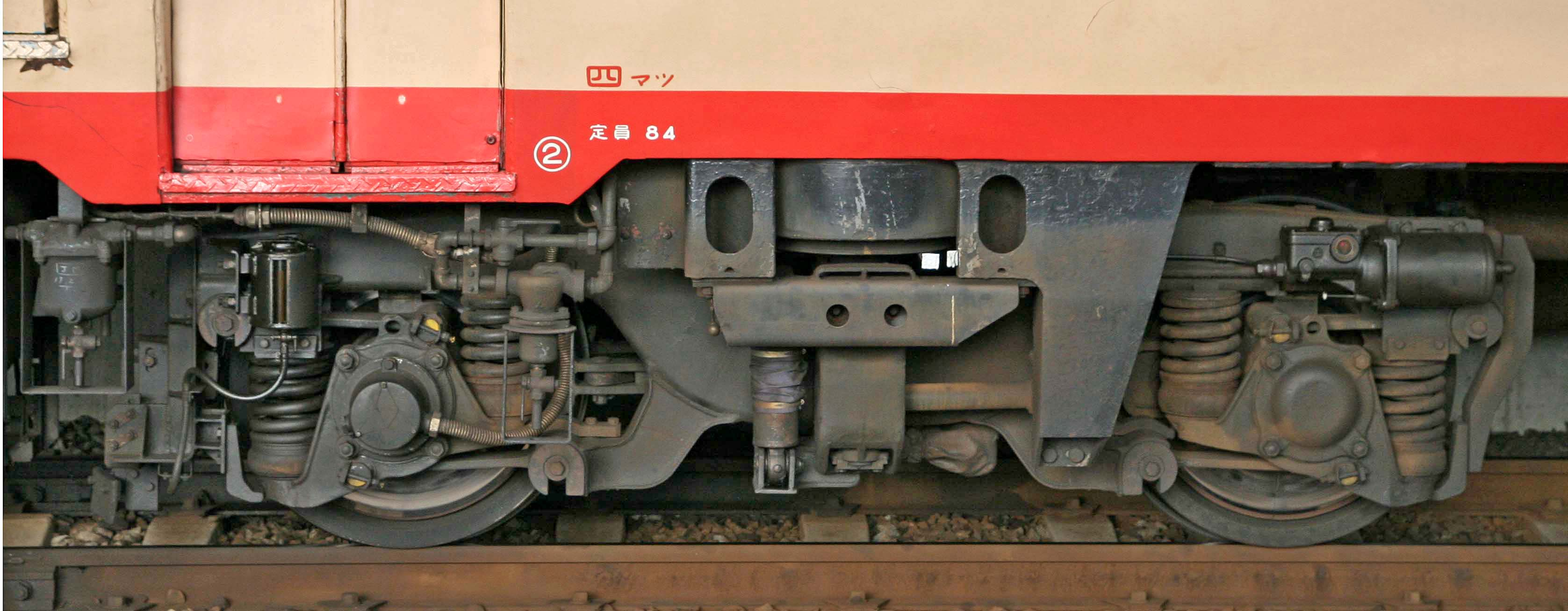 JR四国キハ65形34の台車（DT39）